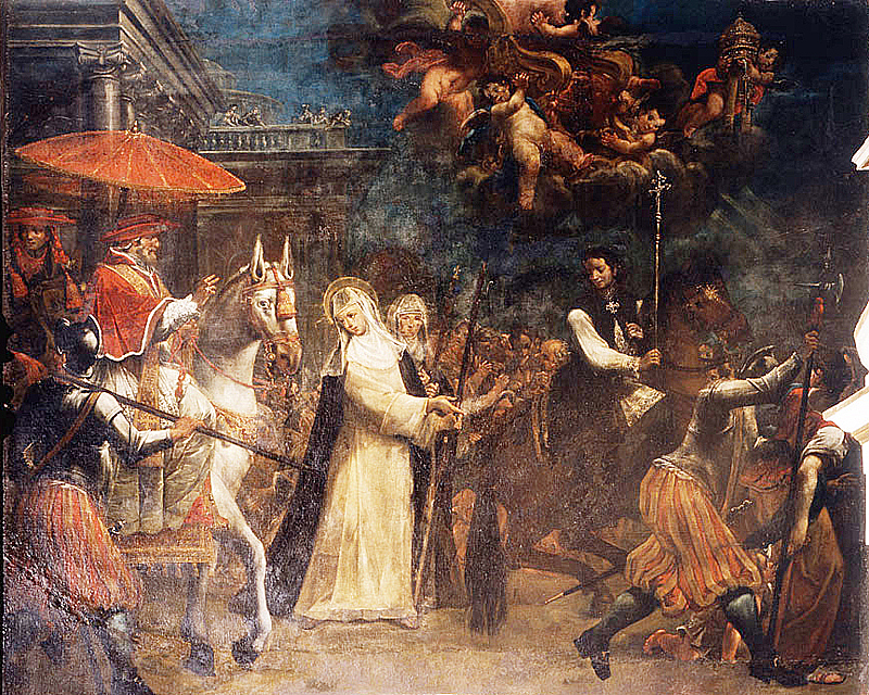 Interprétation par Niccolò Franchini du retour d'un Grégoire XI barbu à Rome